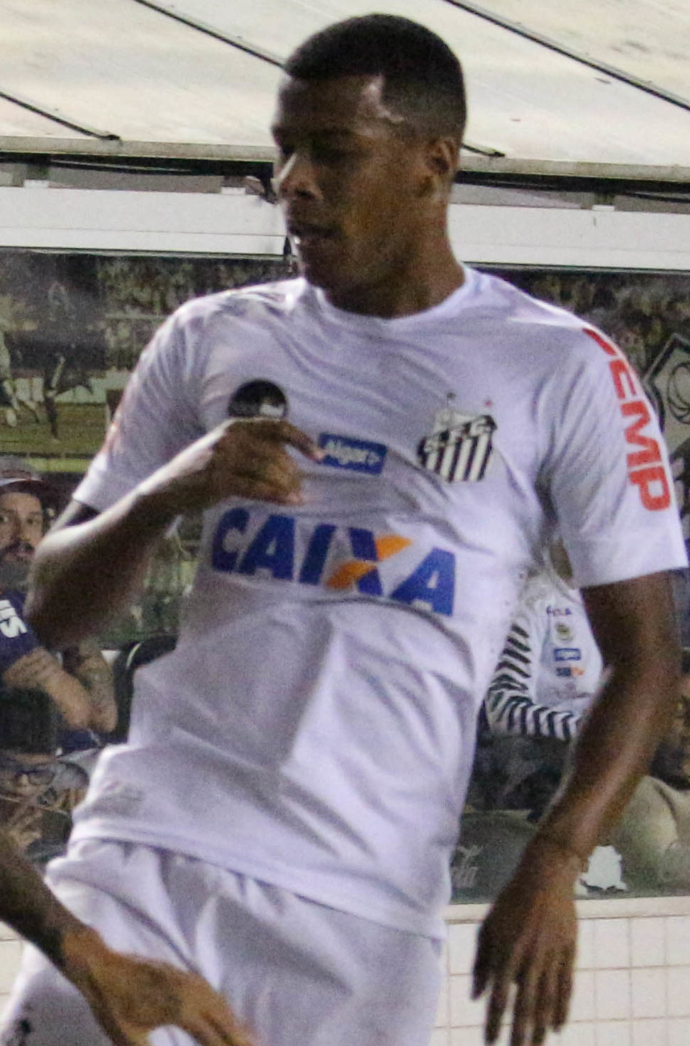 Foto: Douglas Teixeira/futebolsantista.com.br